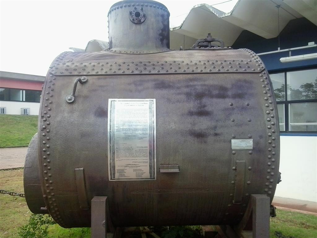 Caldeira atribuída ao Encouraçado São Paulo. navio cruzador que foi palco da "Revolta da Chibata". episódio ocorrido em 22 de novembro de 1910, nas águas da Baía da Guanabara, e que culminou com a abolição definitiva dois castigos por chibatada no interior da Marinha Brasileira